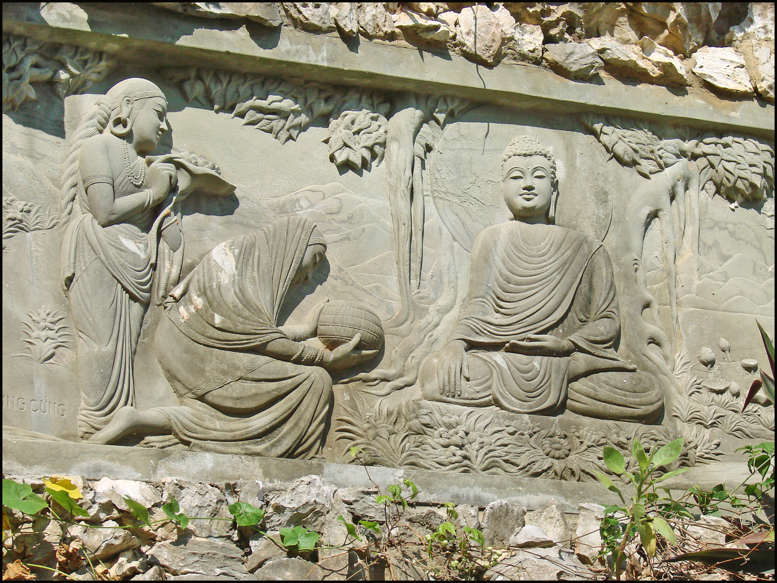 Le premier repas collecté à l'aide du bol à Rájágaha Ne perds pas de vue que tu recherches nibbána. Lorsque tu étais prince, tu mangeais les meilleurs mets, le plus délicat et le plus délicieusement parfumé des riz. À présent, tu as fait le choix de renoncer à toutes ces choses, en vue de parvenir au but suprême qu'est nibbána. Tu dois accepter tout ce qui t'est donné, sans faire le difficile ; ce n'est qu'à ce prix que tu finiras par parvenir à nibbána. Comment pourrais-tu obtenir un bénéfice, quel qu'il soit, si tu commences à suivre les moindres désirs de ce corps, qui n'est rien d'autre qu'un répugnant tas d'immondices ?